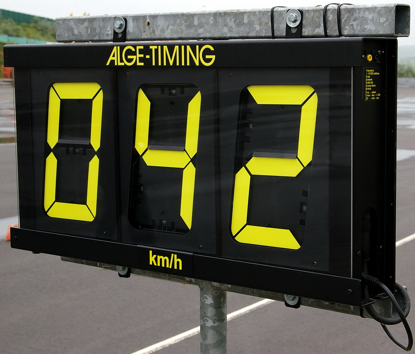 Bildbeschreibung: Siebensegmentanzeige für Geschwindigkeit von Geschwindigkeitsmeßanlage für Kraftfahrzeuge Quelle: eigene Fotografie Fotograf: Johann H. Addicks Genehmigung: GFDL, kein wie auch immer geartetes "Gentlemen-Agreement". Bildnutzung ohne Einhaltung der Bestimmungen der GFDL ist kostenpflichtig und wird vom Rechteinhaber in Rechnung gestellt. Zweitlizensierung auf Anfrage. Es gelten die AGB. Datum: 16.06.2006 Sonstiges: ...